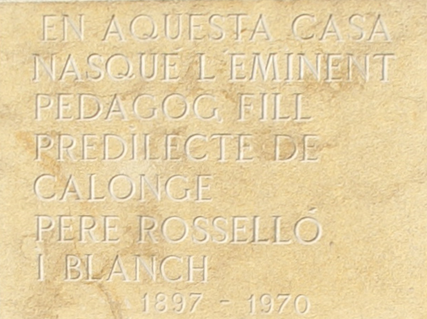 Pedra commemoratiua a la casa nadal d'en Pere Rosselló i Blanch